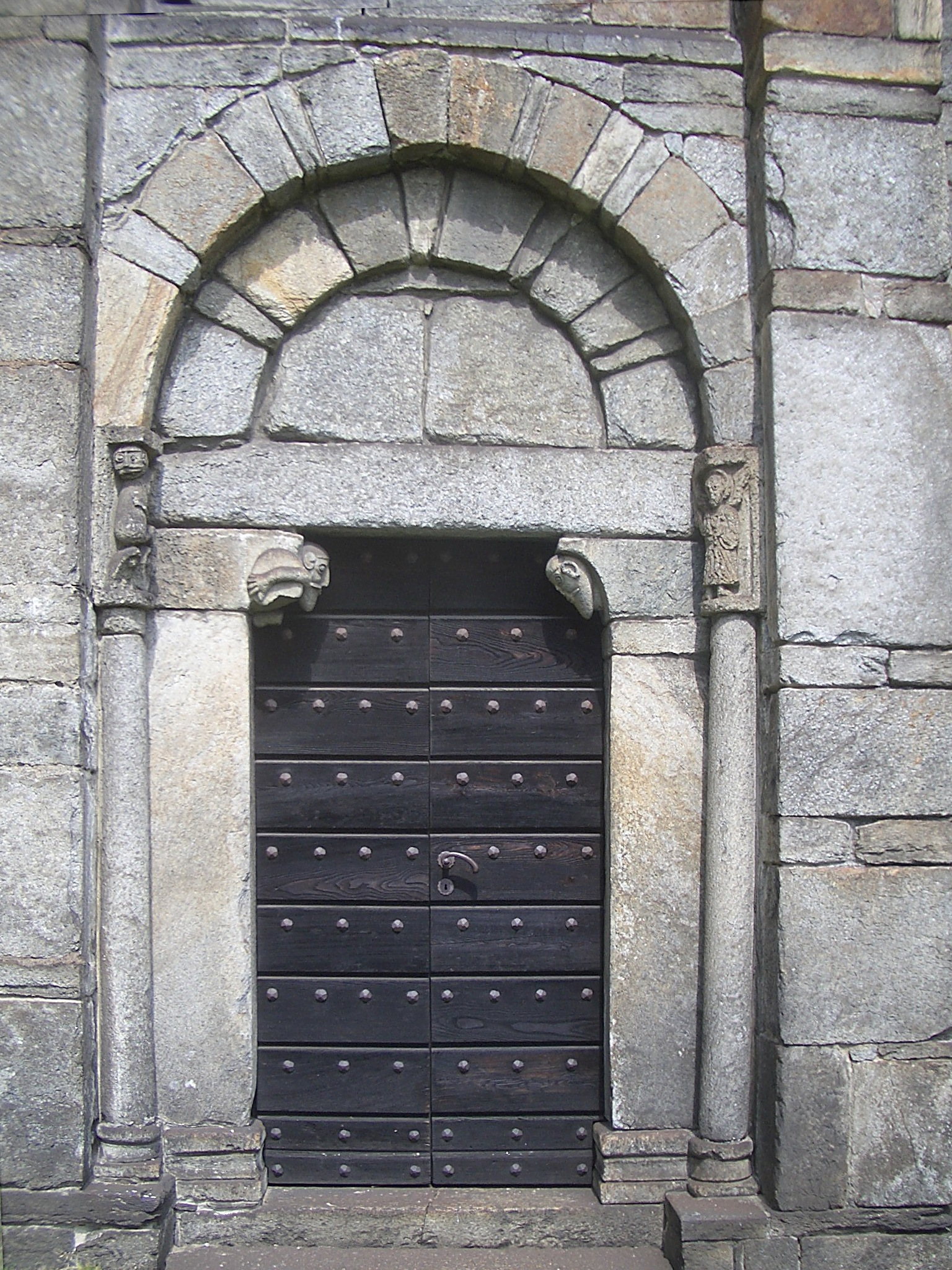 Giornico, St. Nicolao church”, lateral portal, XIII century